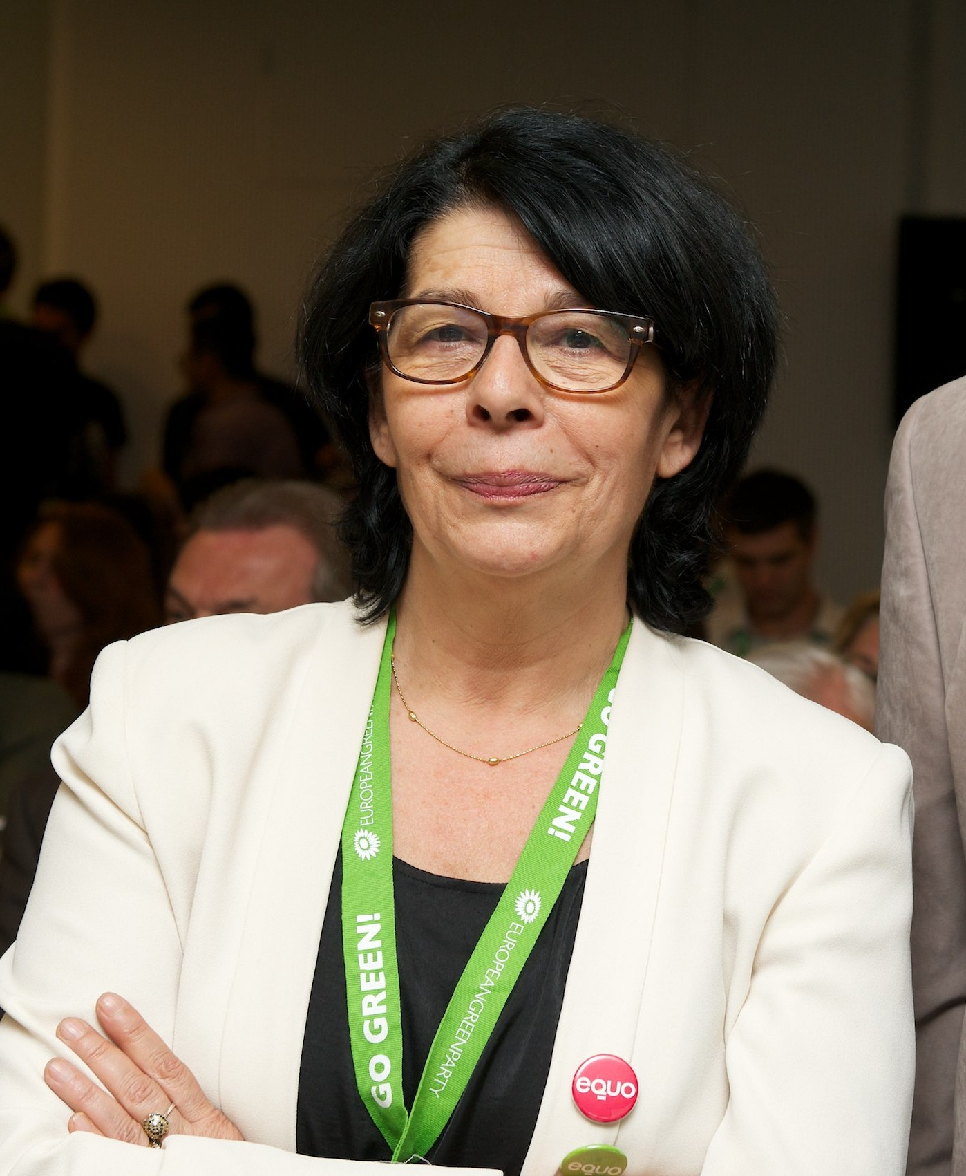 GLB_3281